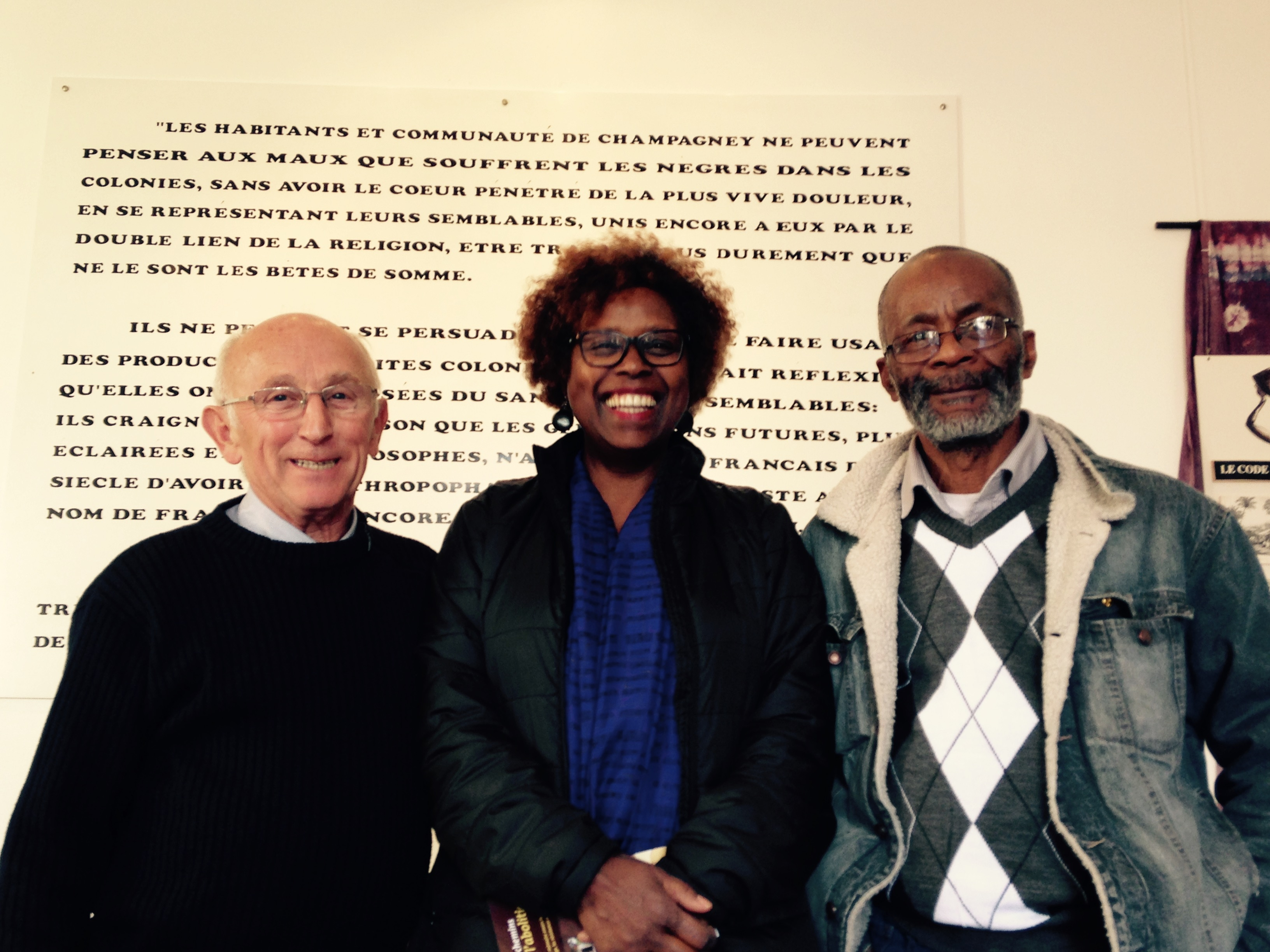 L'ancien maire (1989-2015) de Champagney Gérard Poivey (à gauche) pose en octobre 2015 avec deux représentants d'une délégation de Pierrefitte-sur-Seine devant une reproduction de l'article 29 du cahier de doléances de Champagney à la Maison de la Négritude et des Droits de l'Homme. Personality rights warningAlthough this work is freely licensed or in the public domain, the person(s) shown may have rights that legally restrict certain re-uses unless those depicted consent to such uses. In these cases, a model release or other evidence of consent could protect you from infringement claims.